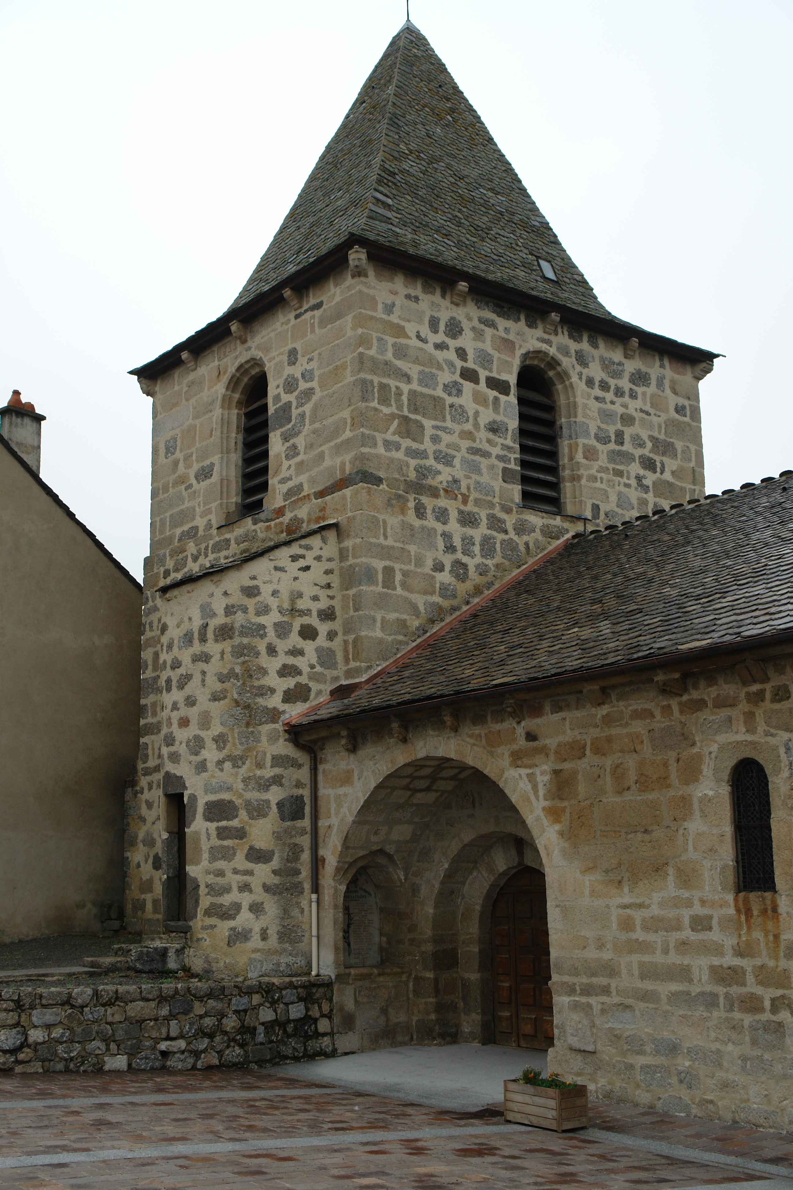 Église de Grandrieu Map it: Google Earth | Street | Satellite | Hybrid | Nautical